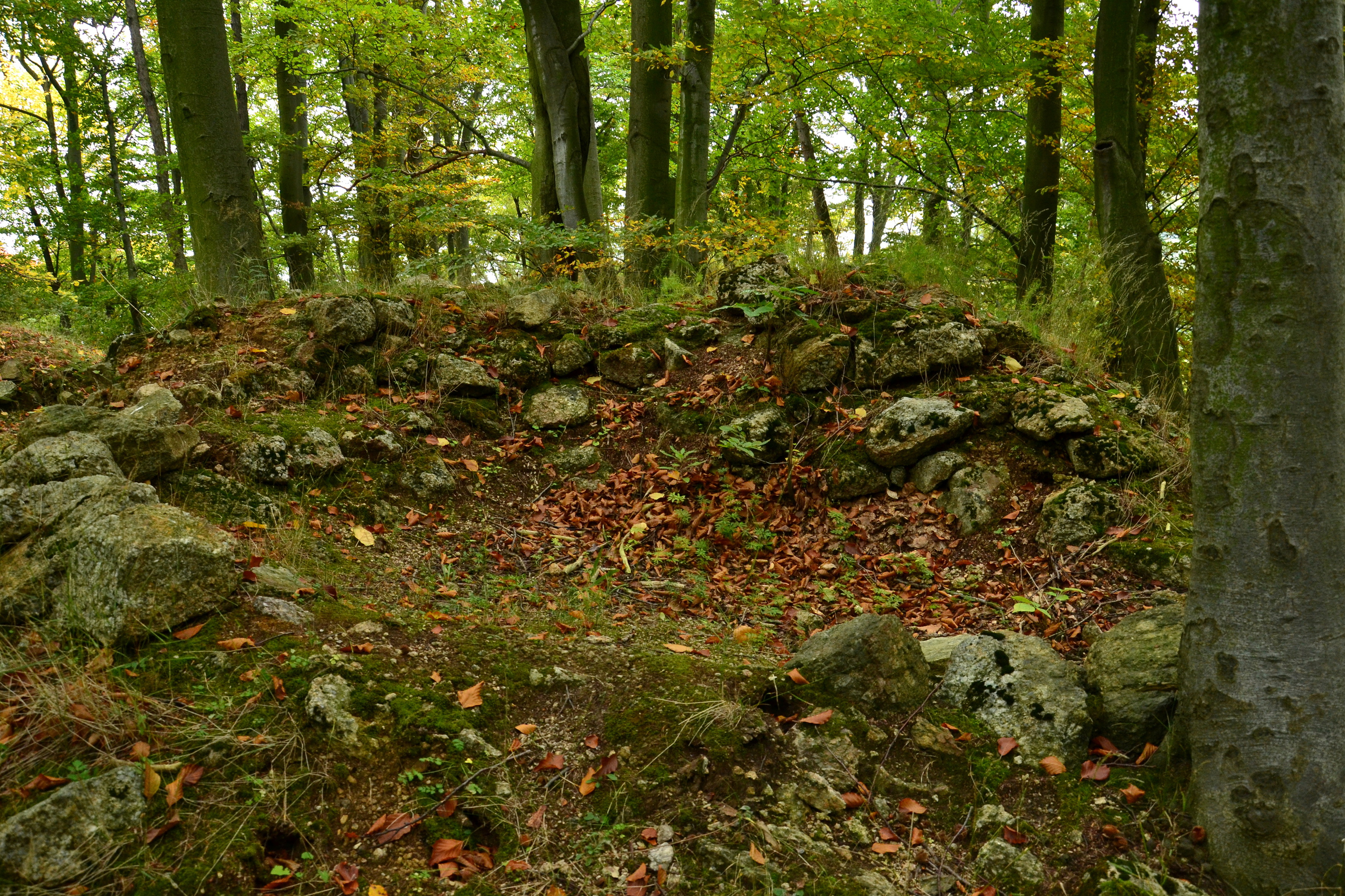 Hrad u Albrechtic - torzo bergfritu